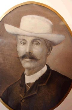 Retrato de Luis Pacheco Bertora (1832-1897)